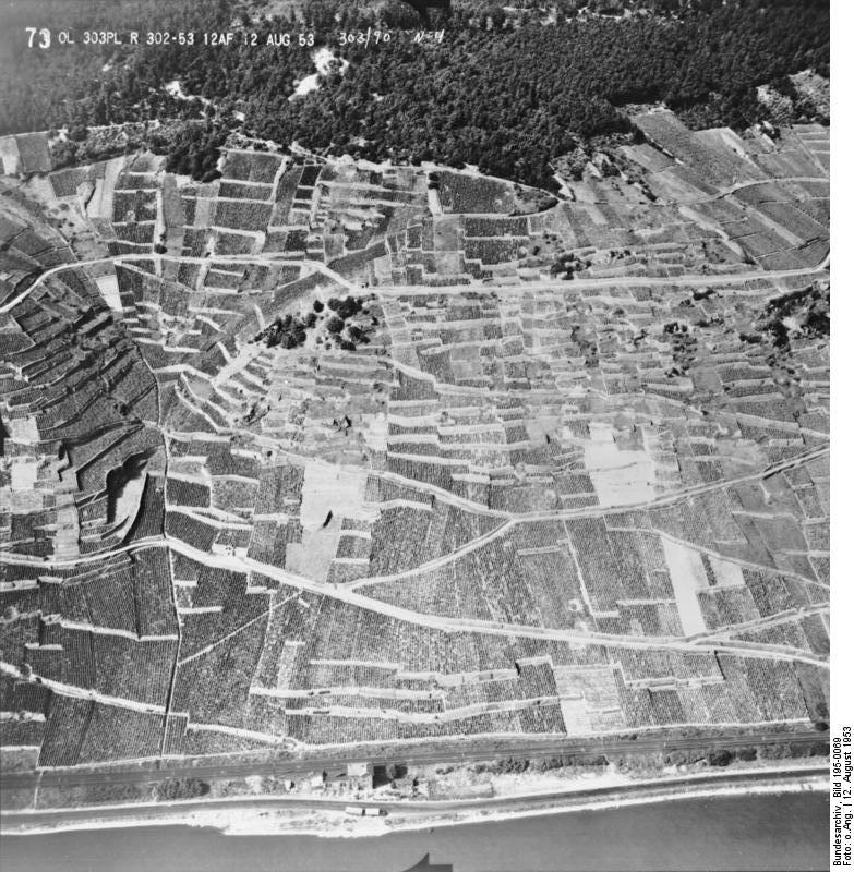 Rheinbefliegung der Alliierten 1953